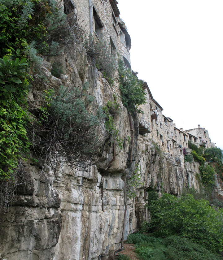 Tourrettes-sur-Loup, Alpes-Maritimes, France